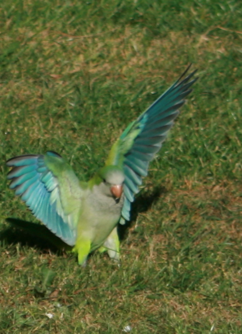 Monk parakeet landing in a park is Brussels